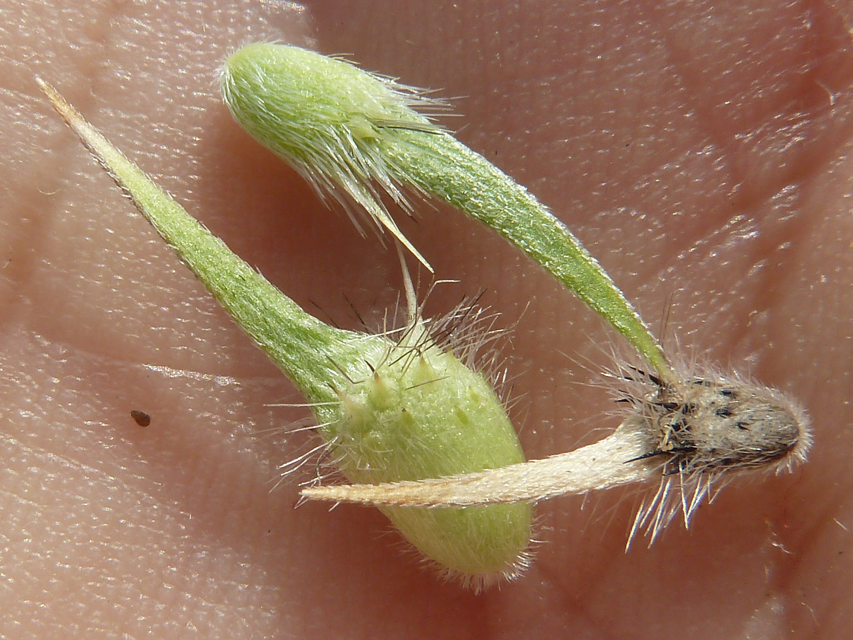 Bituminaria bituminosa : Frutos maduros e inmaduros - Circunvalación Norte, Águilas (Murcia, España).